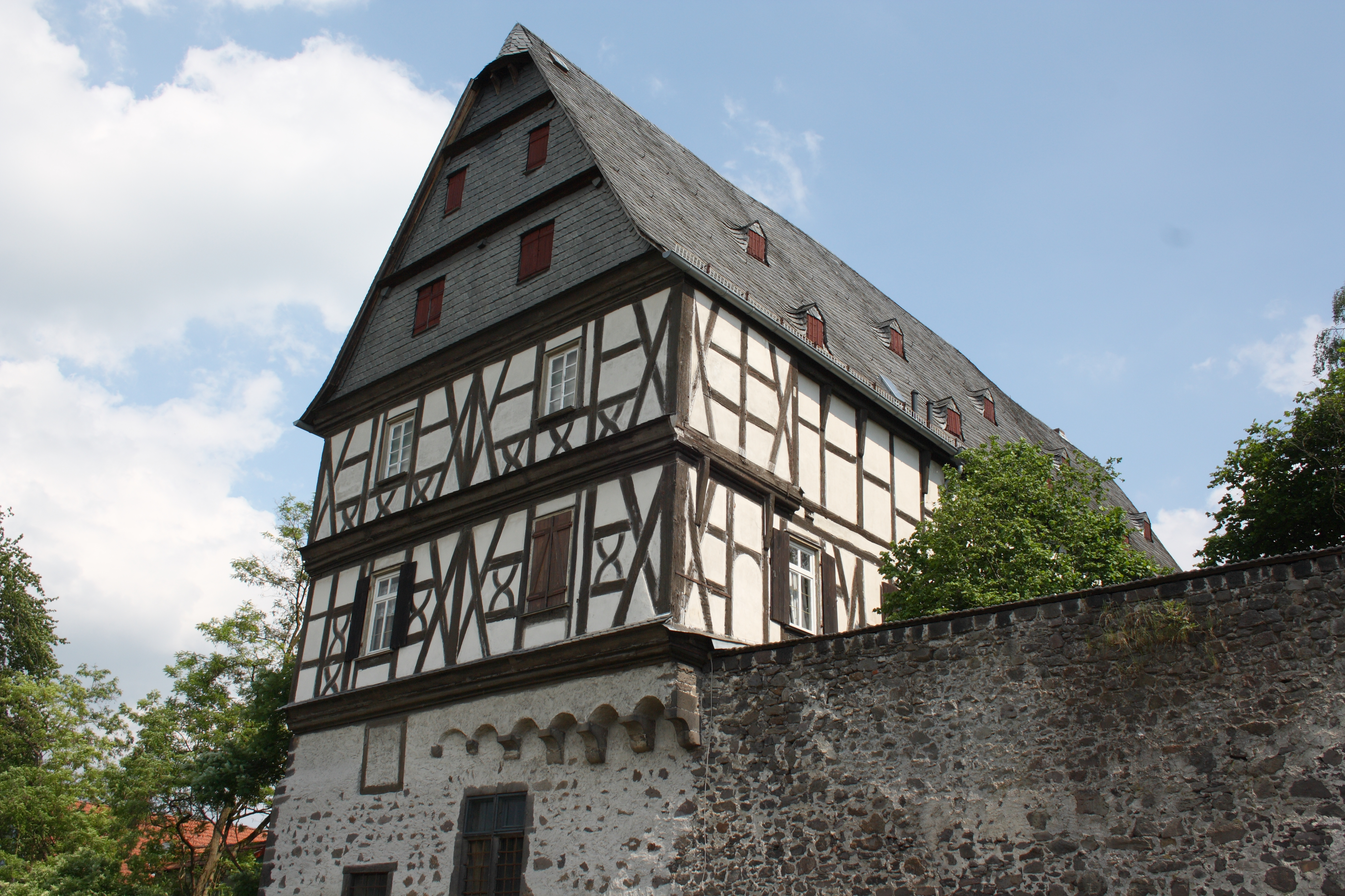 Wirtschaftsgebäude des Antoniterklosters in Grünberg